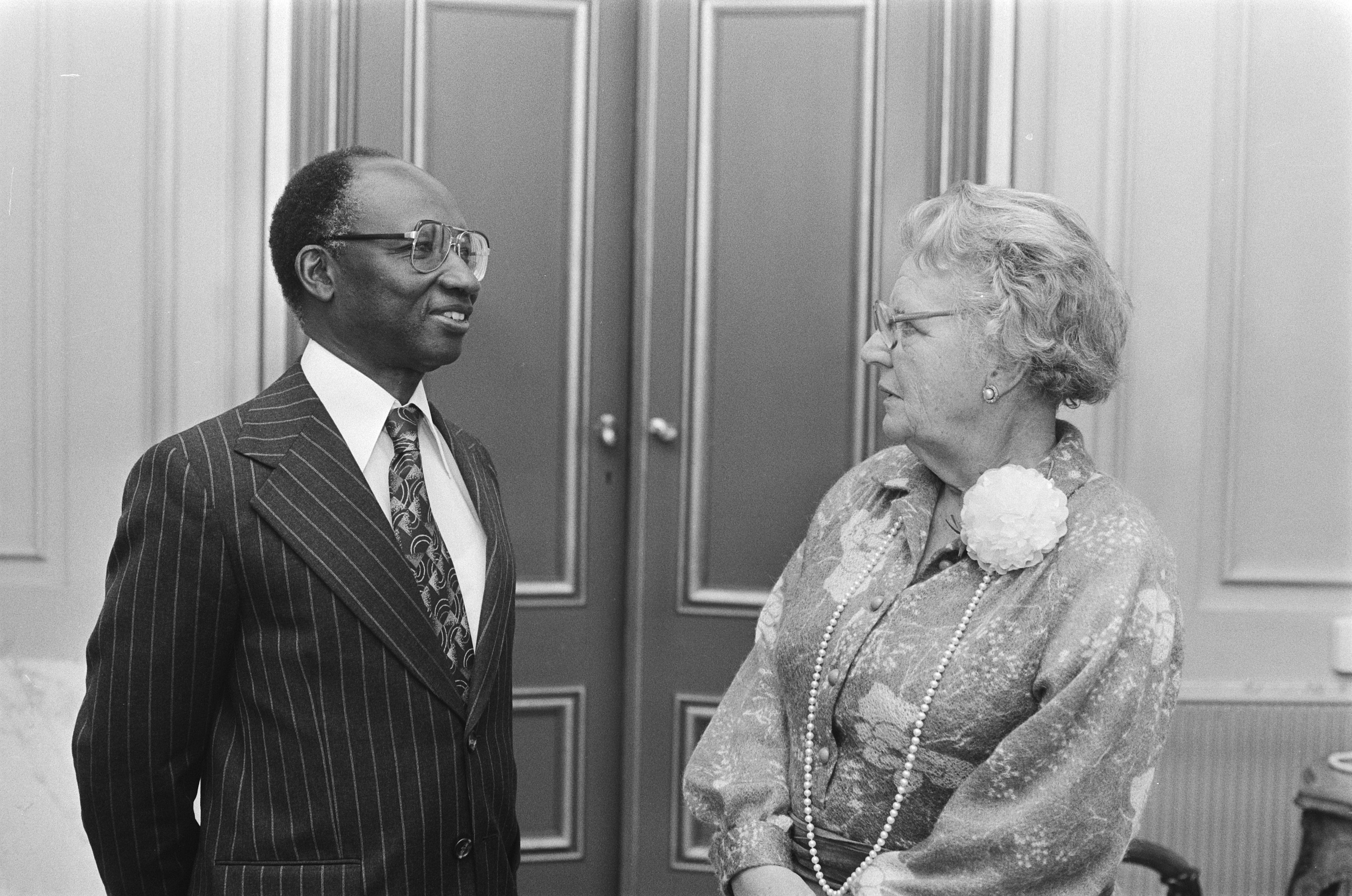 Collectie / Archief : Fotocollectie Anefo Reportage / Serie : [ onbekend ] Beschrijving : Koningin Juliana ontvangt president Dawda Kairaba Jawara van Gambia Datum : 22 november 1978 Trefwoorden : koninginnen, ontvangsten, presidenten Persoonsnaam : Jawara, Dawda Kairaba , Juliana (koningin Nederland), Juliana, koningin Fotograaf : Croes, Rob C. / Anefo Auteursrechthebbende : Nationaal Archief Materiaalsoort : Negatief (zwart/wit) Nummer archiefinventaris : bekijk toegang 2.24.01.05 Bestanddeelnummer : 930-0094